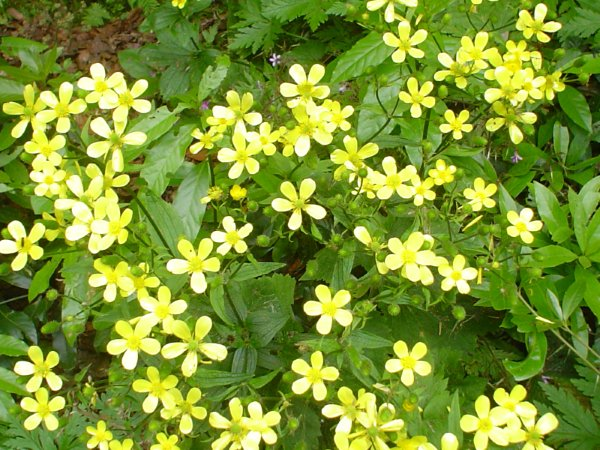 Plantas de Anaga